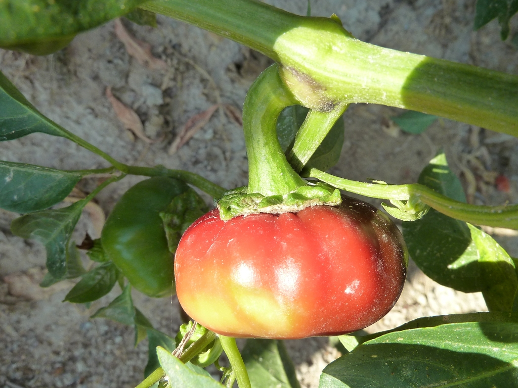 Capsicum annuum cv. Pimiento Bola/Ñora : Frutos inmaduro y maduro in situ - Camino del Canalillo, Albatera (Alicante, España).